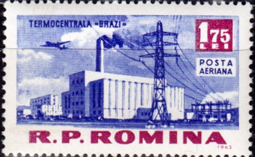 Termocentrala Brazi